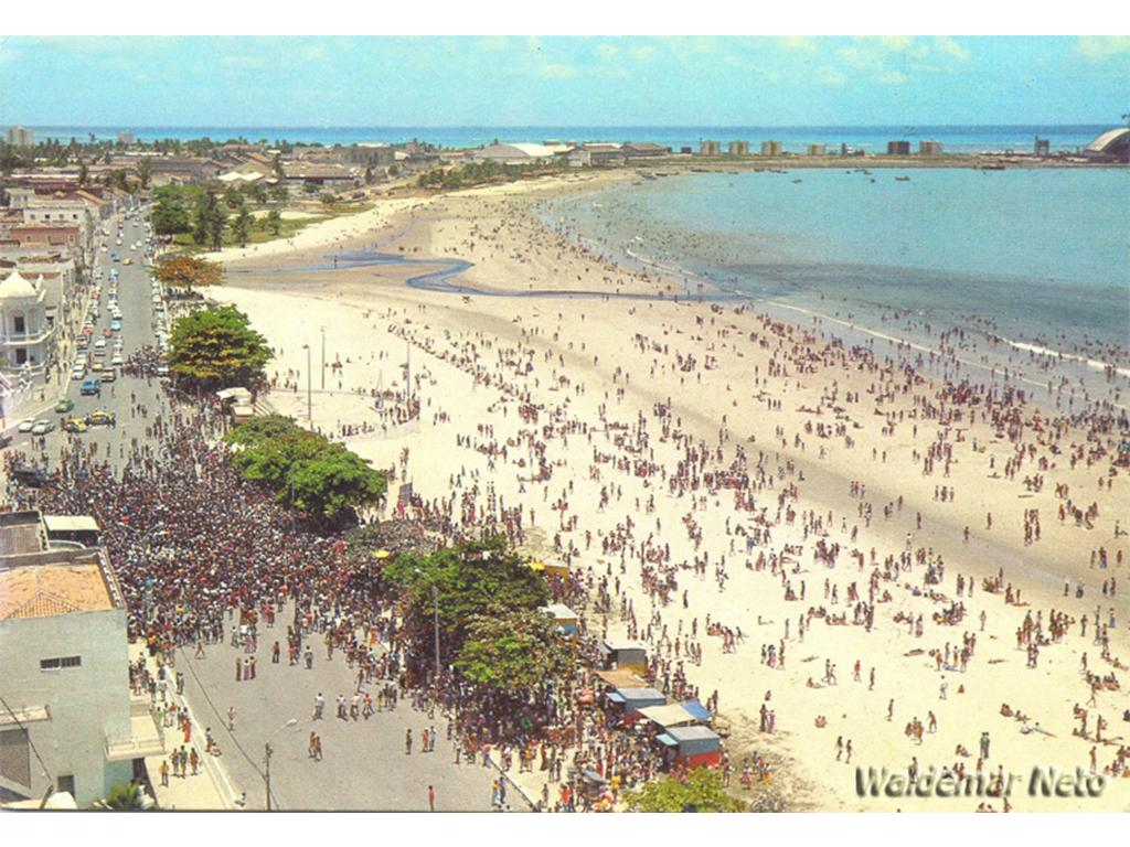 Carnaval na década de 70